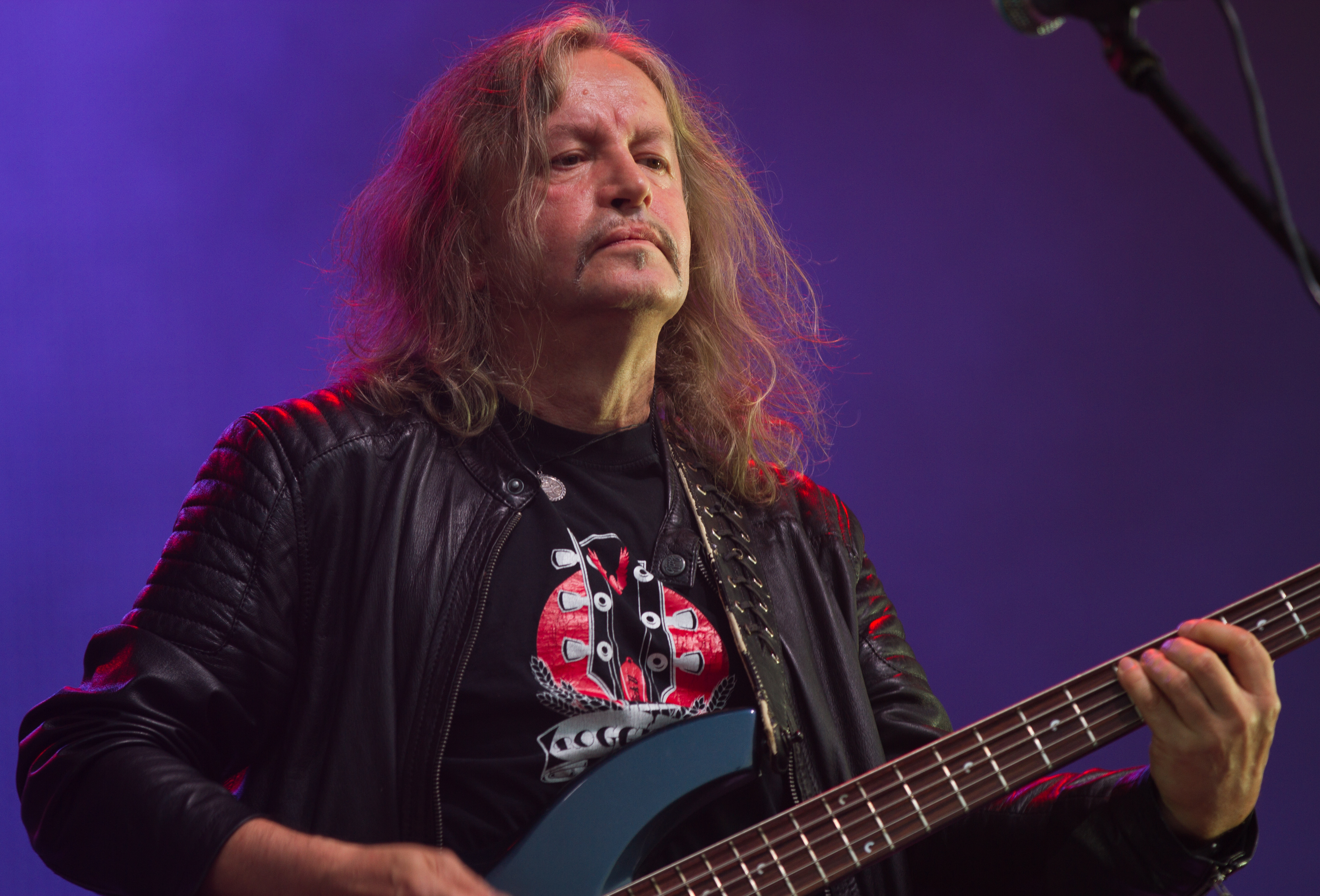 Peter „Bimbo“ Rasym beim "Puhdys - Das große Abschiedskonzert 2015" in der Kindl-Bühne Wuhlheide